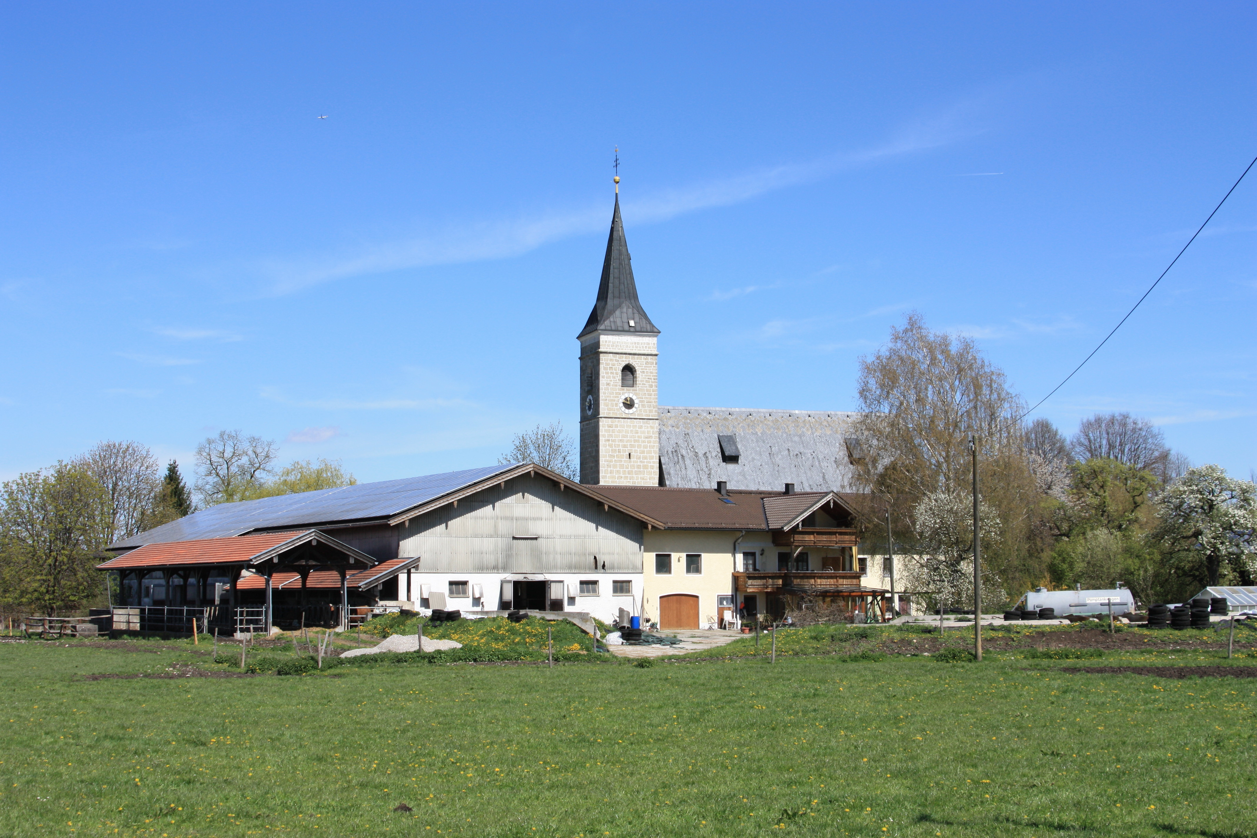 Trostberg OT Deining